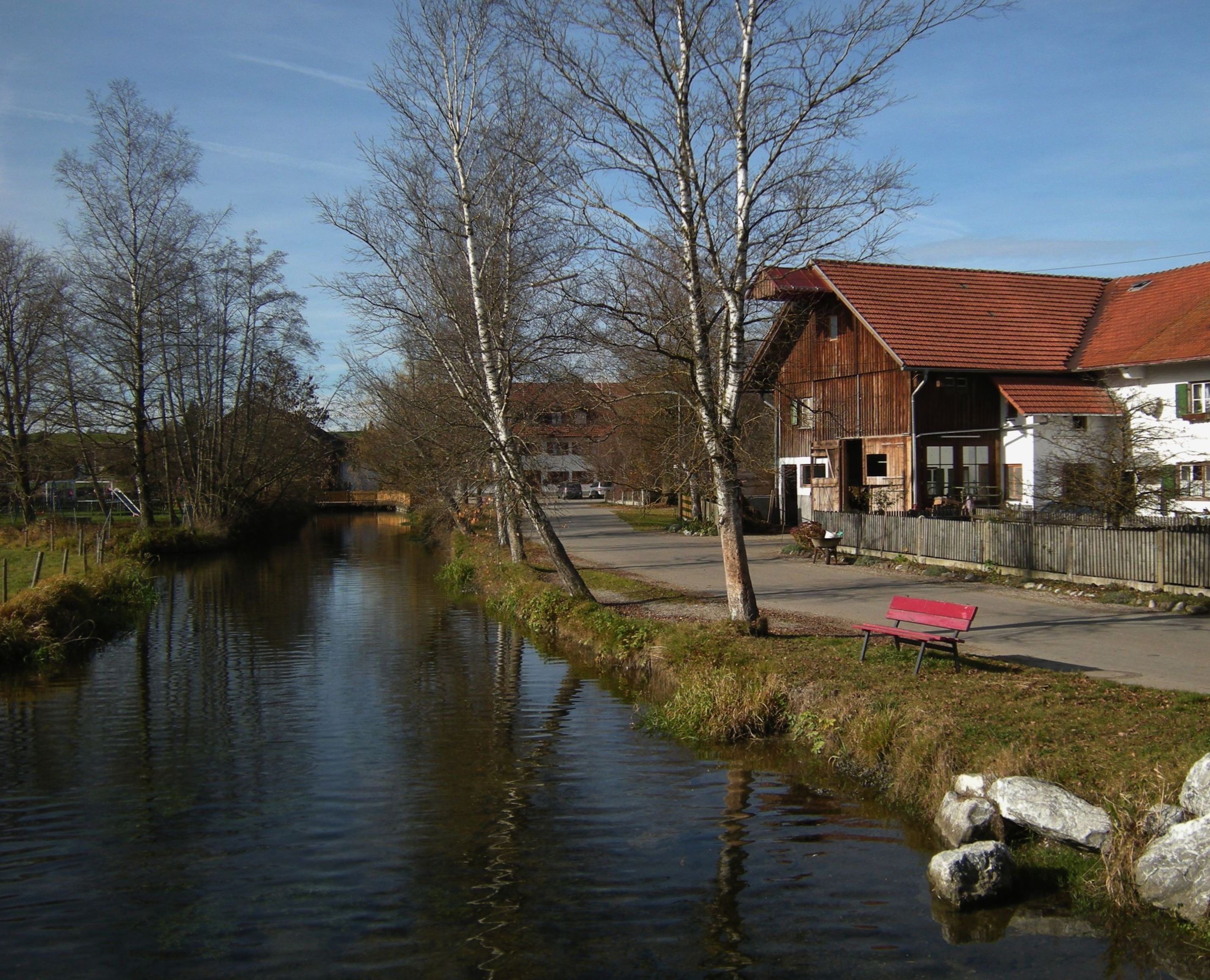 Aitrang an der Kirnach - Bauernhaus an der Kirnach.jpg